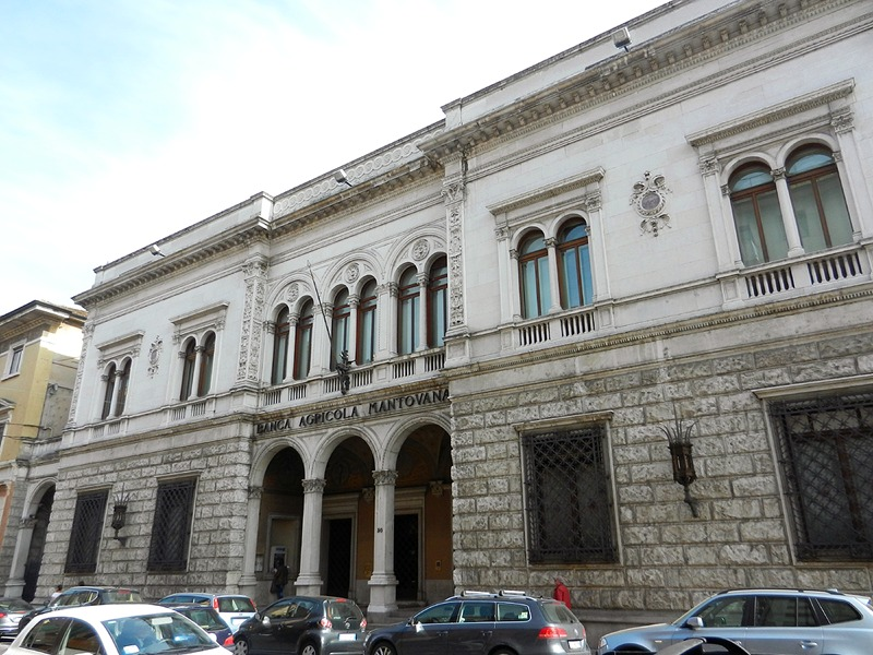 Mantova - Palazzo della Banca Agricola Mantovana